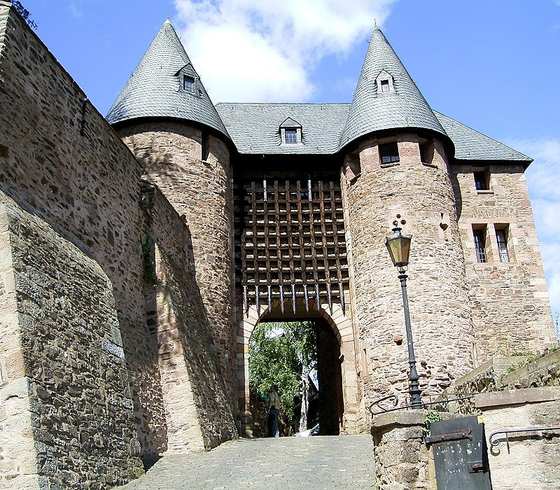 Burg Hengebach in Heimbach / Castle Hengebach in Heimbach, Germany